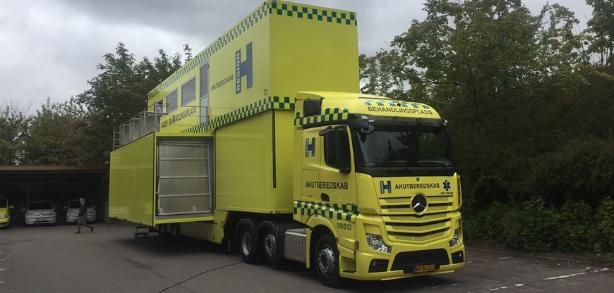 Region Hovedstadens behandlingsplads opbygget på en lastbil